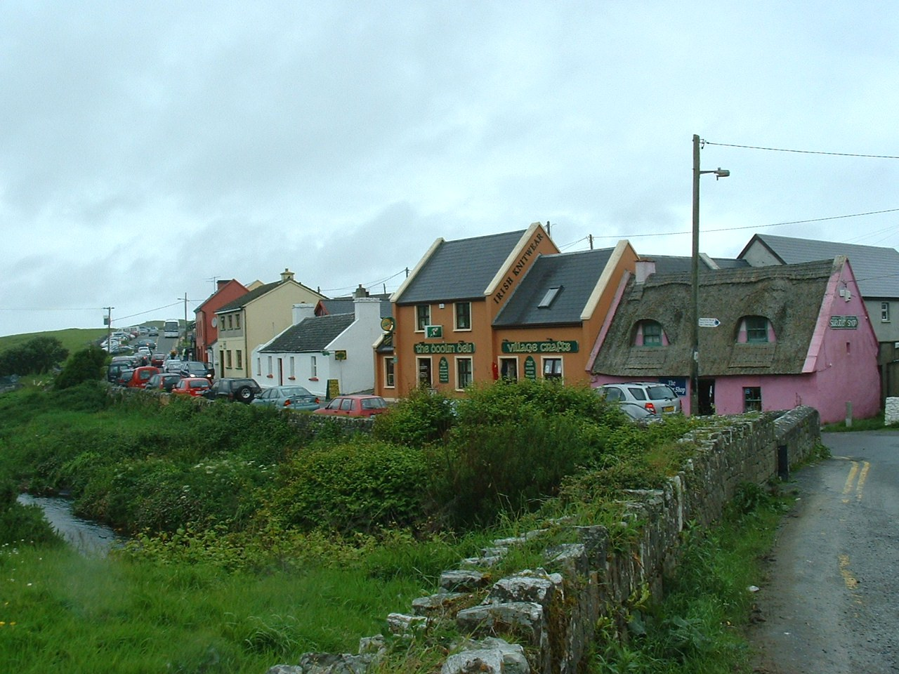 Fisherstreet di Doolin - foto scattata dall'utente Retaggio